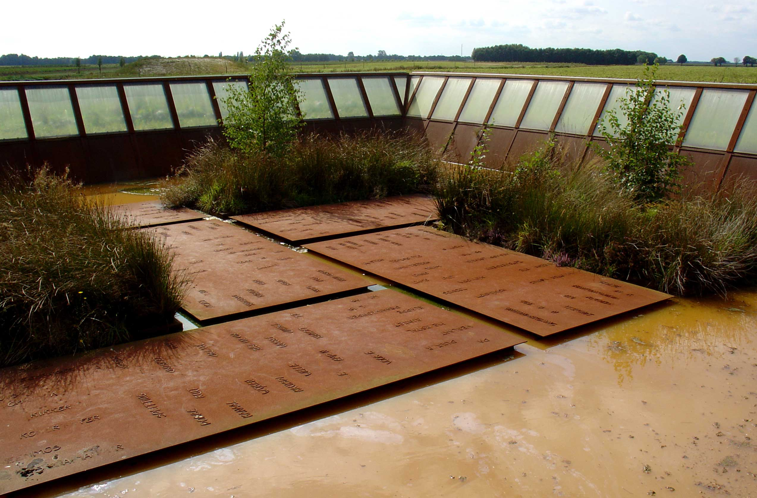 Het Fort voor het Water, kunstobject door Jeroen van Westen bij de Runde in de omgeving van Roswinkel